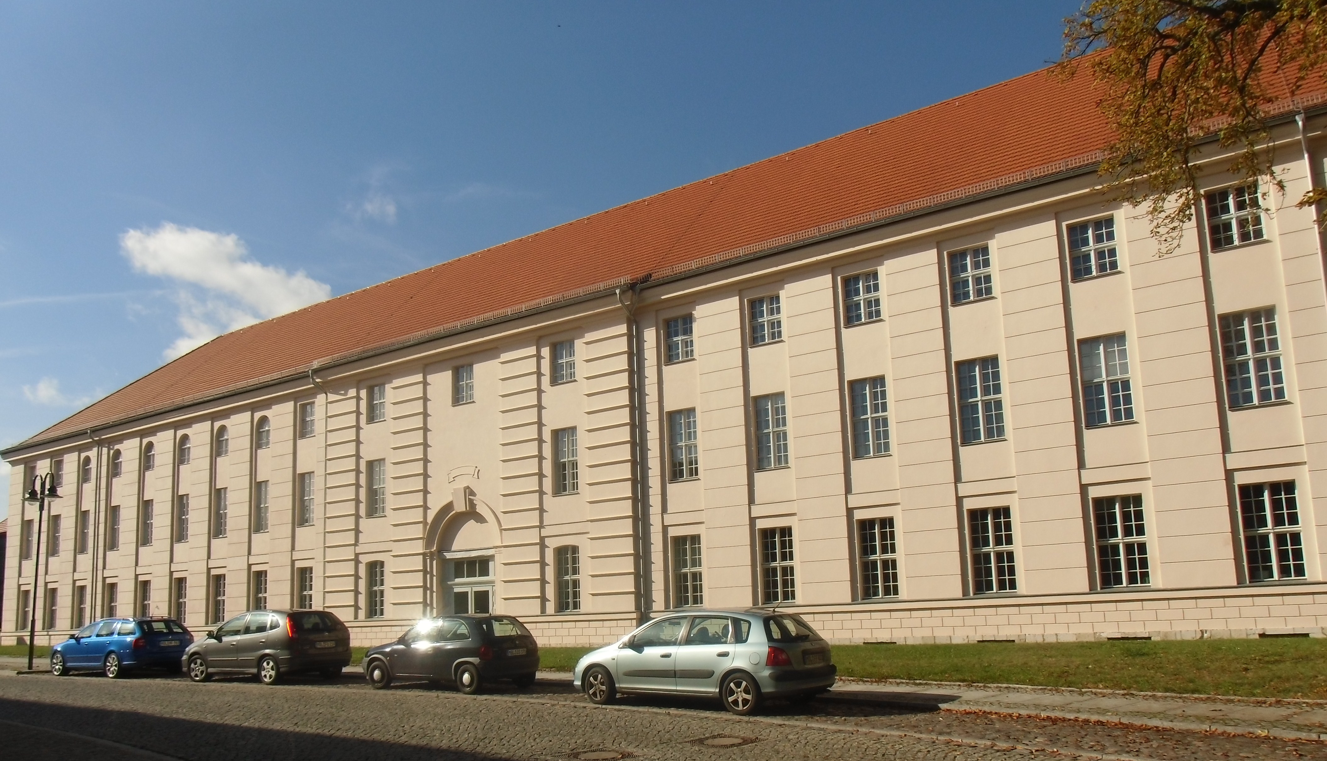 Denkmalgeschützter Sitz des Landrats Märkisch-Oderland Klosterstraße 14 im ehemaligen Landarmen- und Militärinvalidenhaus, Nr. 37 in der Liste der Baudenkmale in Strausberg